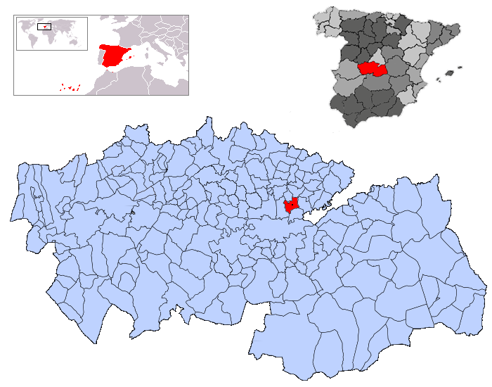 Magán en la provincia de Toledo